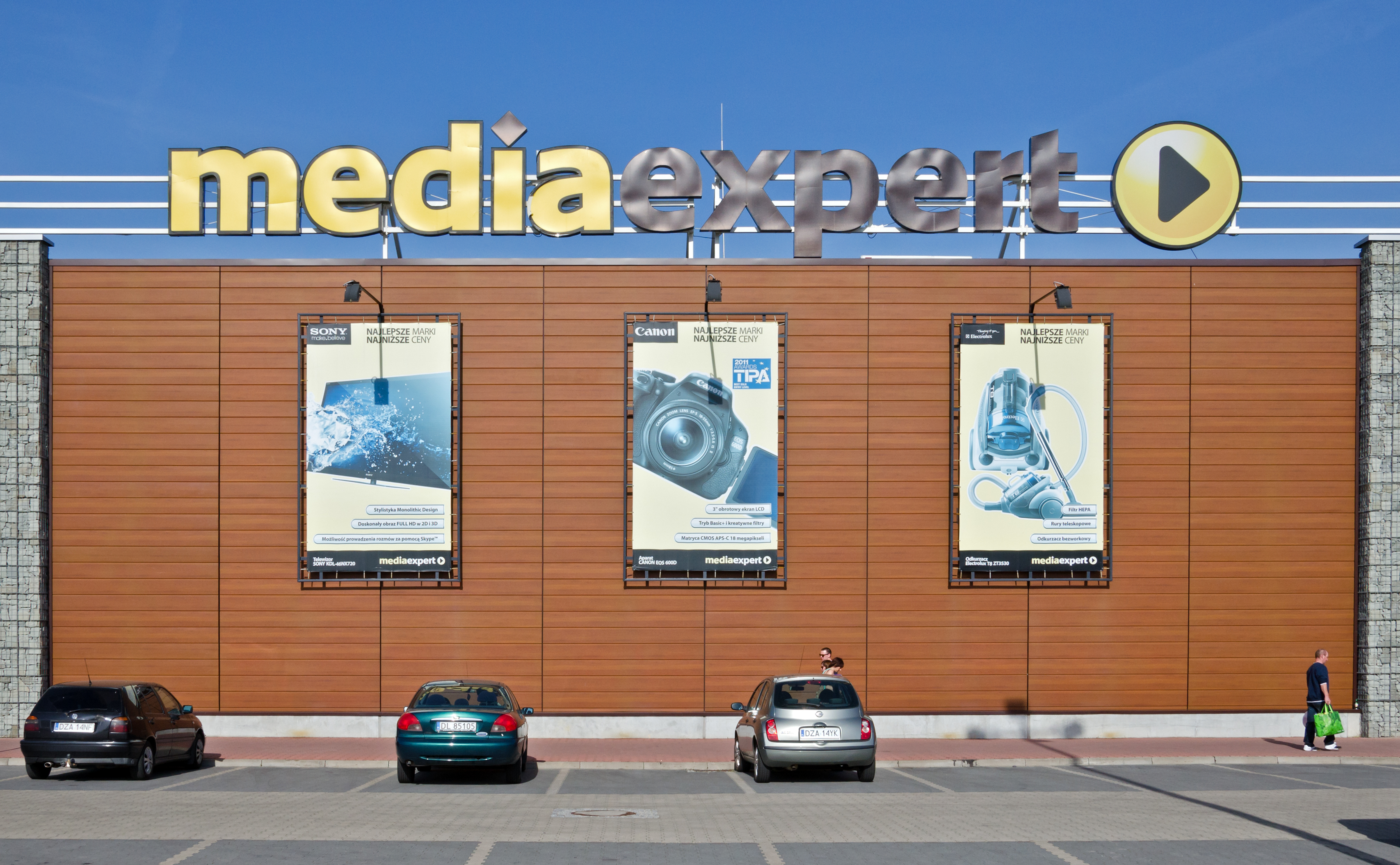 Galeria handlowa Twierdza Kłodzko